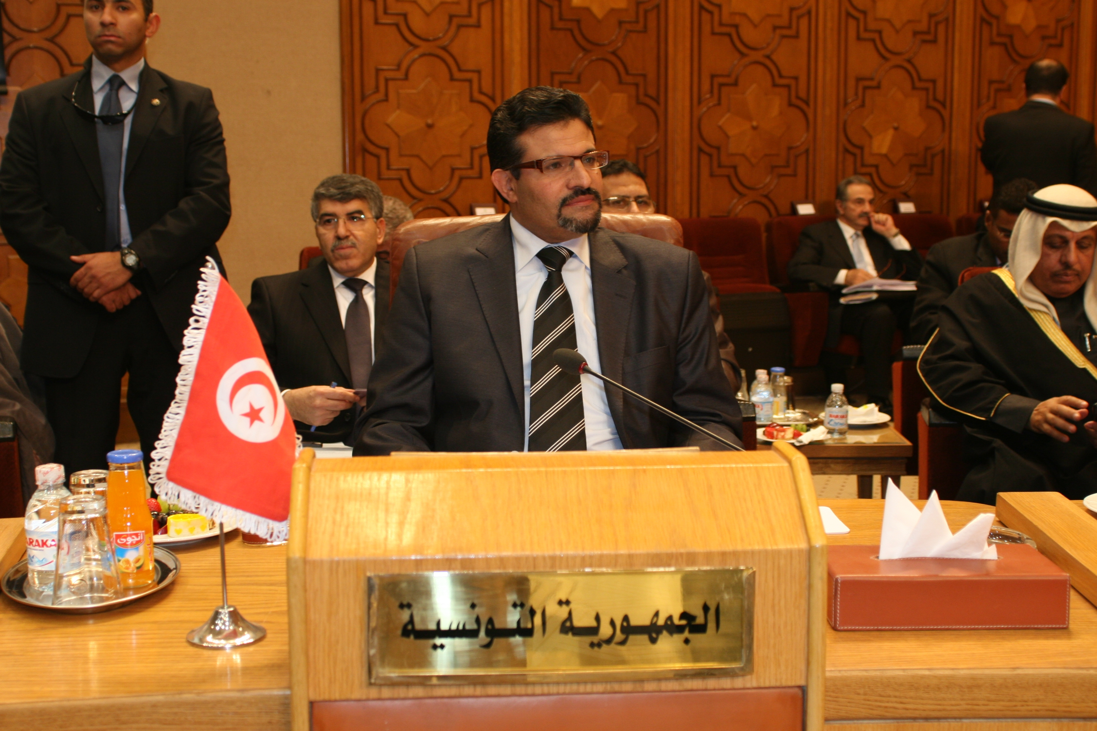 Le Ministre des Affaires Etrangères, Rafik Abdessalem, s’est entretenu, samedi 21 Janvier 2012, au Caire, avec son homologue égyptien Mohamed Kamel Amr et le Secrétaire général de la Ligue des Etats Arabes Nabil Al-Arabi. Ces entretiens interviennent en marge de sa participation, dimanche, à la réunion du Conseil des ministres arabes des Affaires étrangères de la Ligue des Etats arabes sur la situation en Syrie.